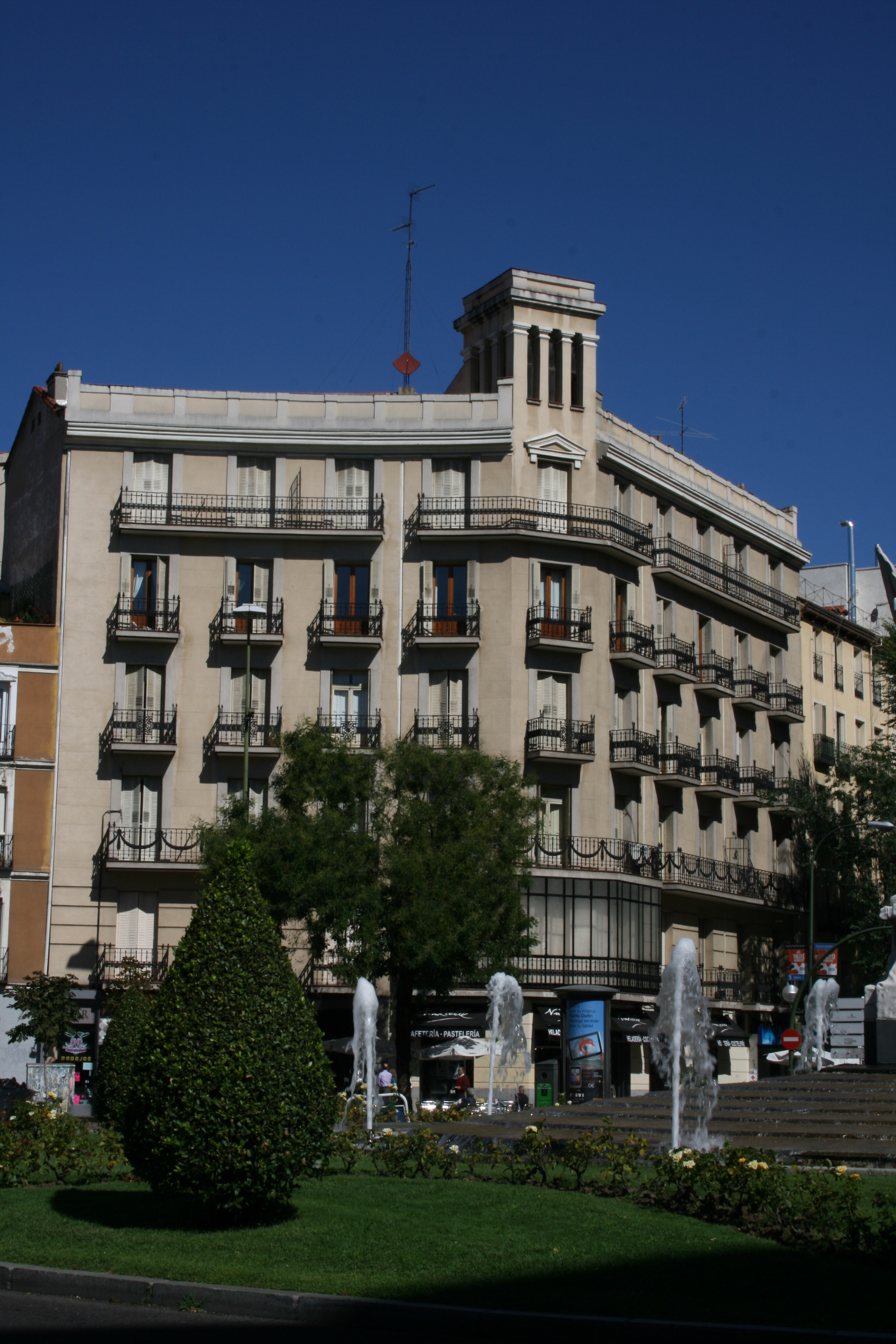 Gorieta de Quevedo - Obra de Antonio Palacios